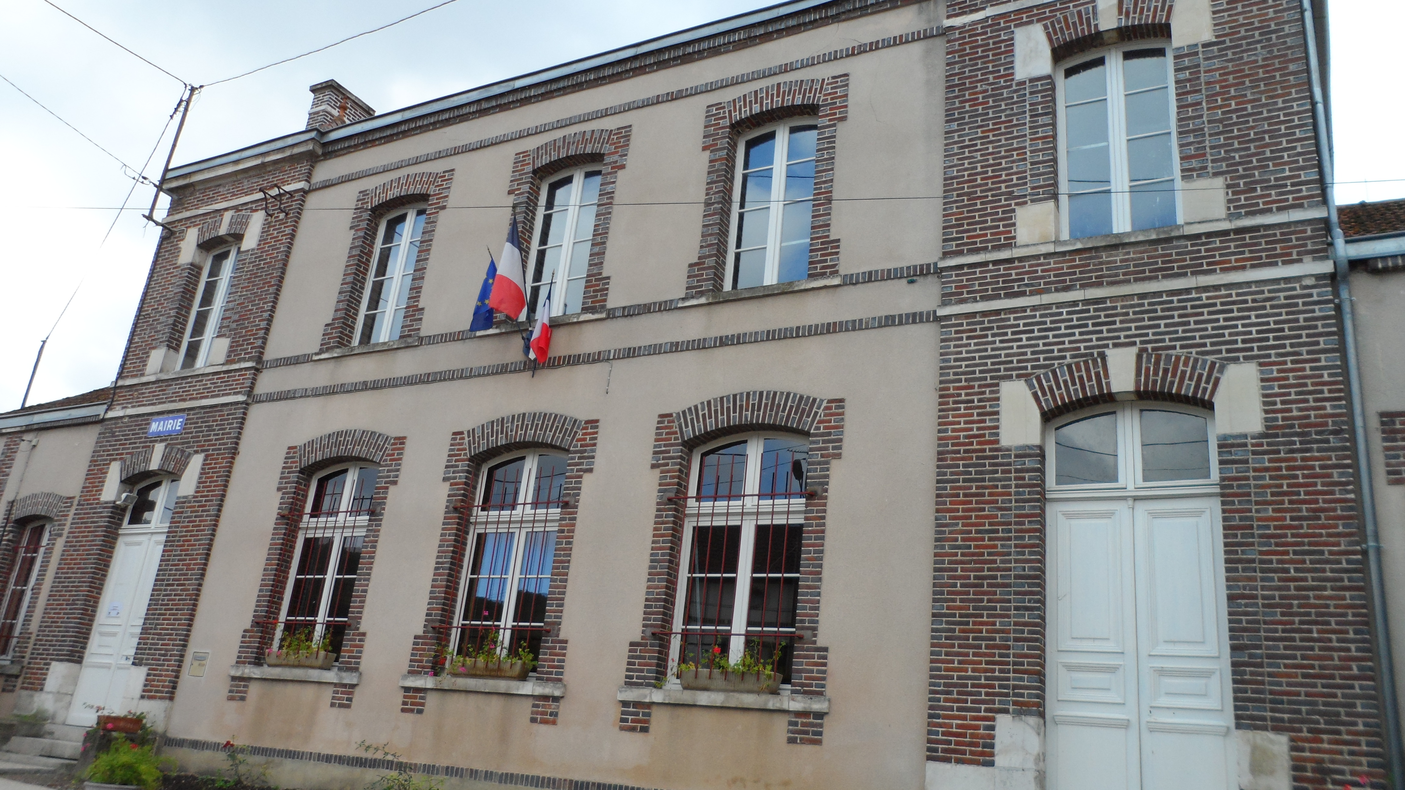 Mairie de Saint-Aubin-sur-Yonne (Yonne) France